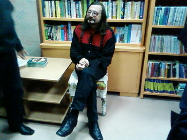 Ігор Римарук на презентації "Бермудського трикутника" у київській книгарні.